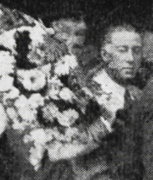 Édouard Brisson en 1927 (à la coupe Boillot).